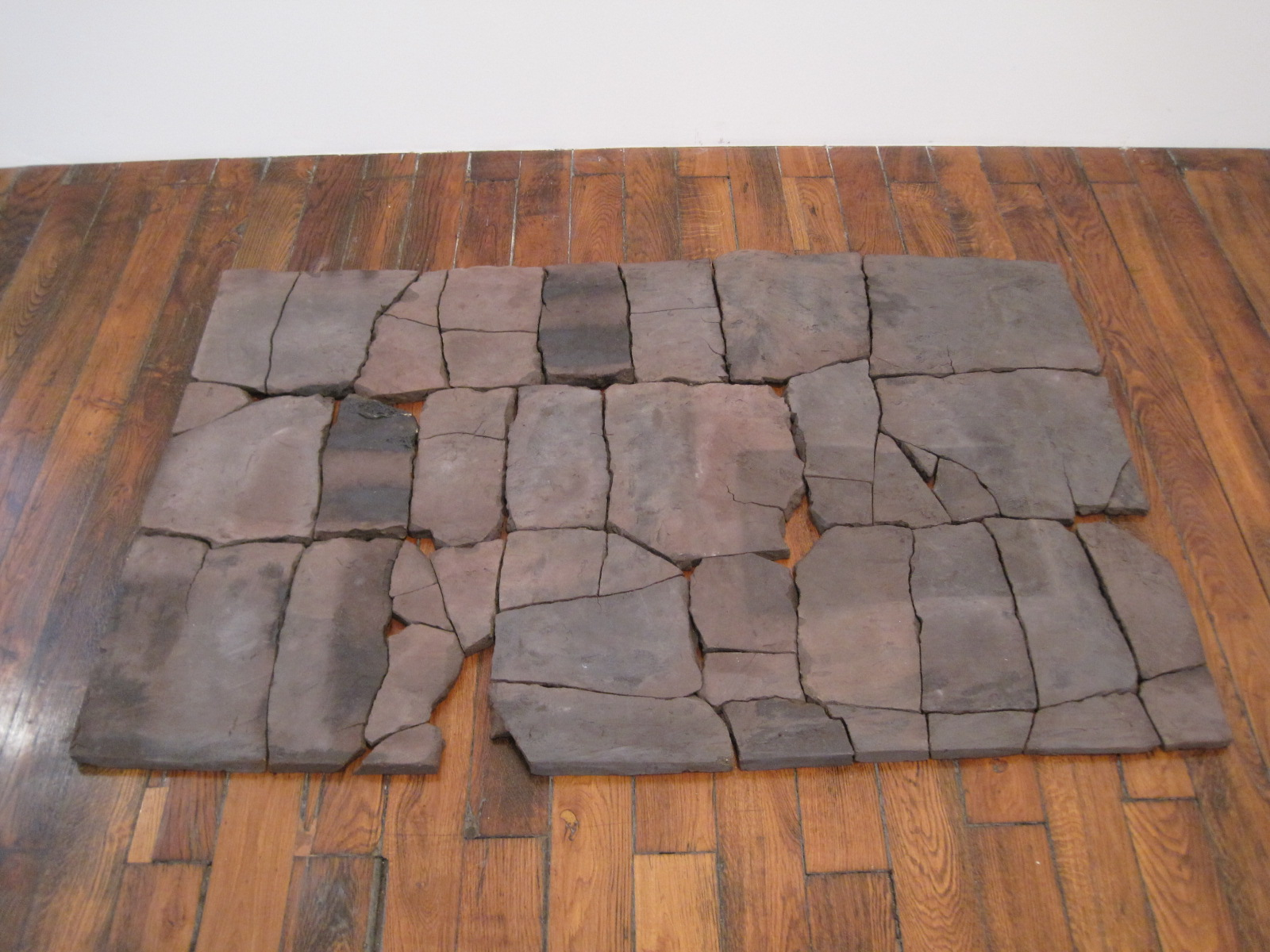 Musée art Montbéliard - Céramique de l'artiste Katinka Bock